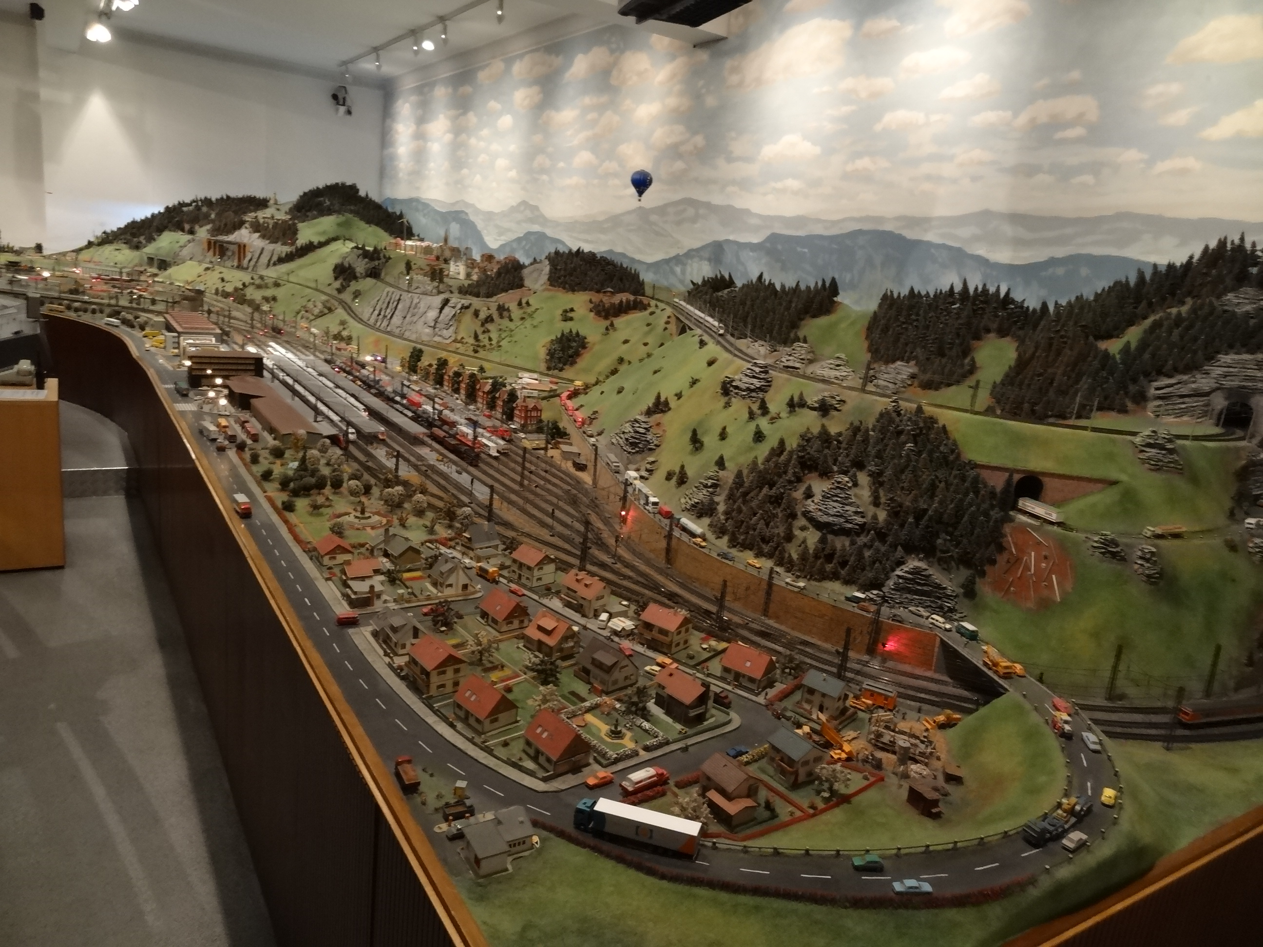 Model railroad at DB museum, Nuremberg